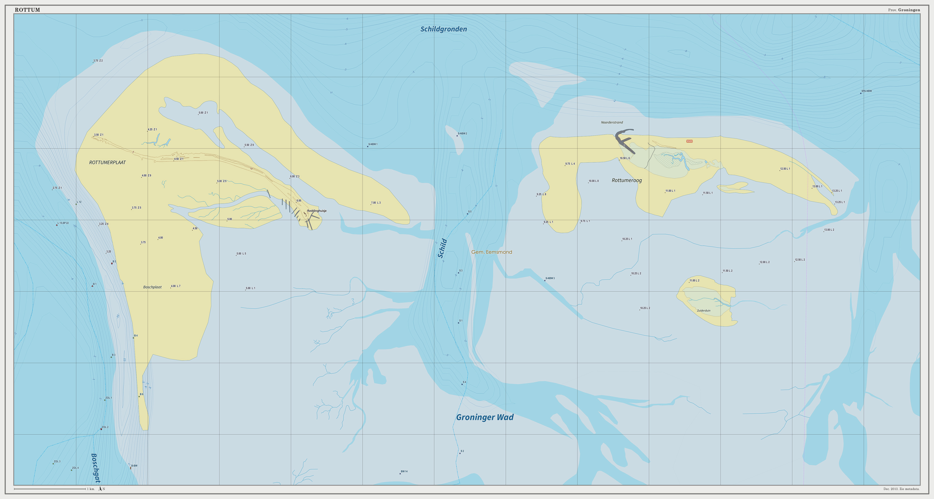 Topografische kaart van Rottumerplaat en Rottumeroog, 2013. Resolutie: 300 pixels/km. Kaartbeeld samengesteld uit de open geodata van de Top10NL en Top25namen (Basisregistratie Topografie, Kadaster 28-apr-2014), Creative Commons BY licentie. Gebouwvlakken uit open geodata BAG extract (8-jun-2014). Wegen uit de OpenStreetMap (8-jun-2014), OpenStreetMap community. Reliëfschaduw uit de Actuele Hoogtekaart AHN2 (8-mrt-2014). Samenstelling en kleurenschema: Jan-Willem van Aalst, met QGIS2. Zie ook de Legenda.